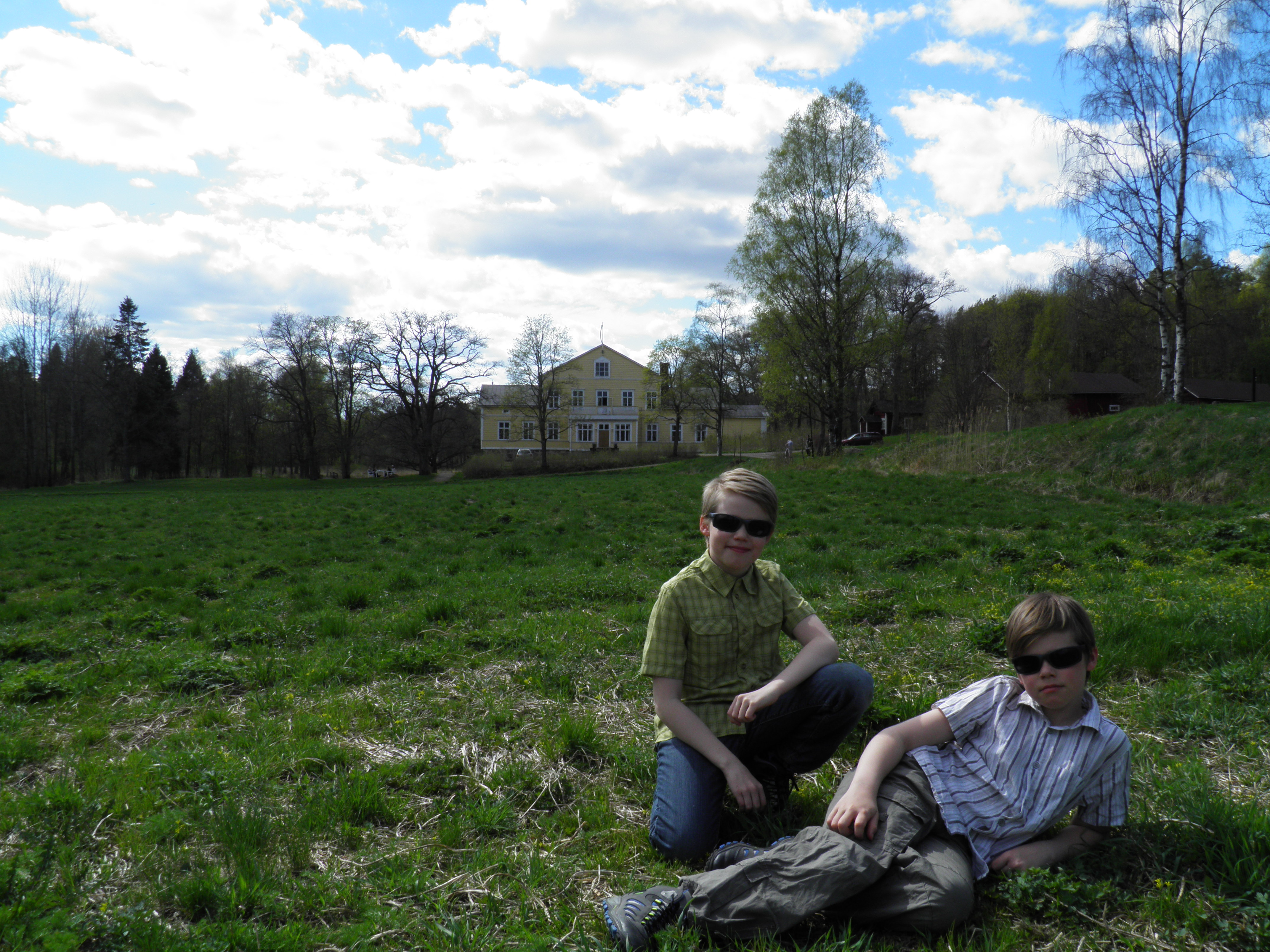 Terho ja Tarmo Kauppinen (isän puolelta Wallenius-sukua)